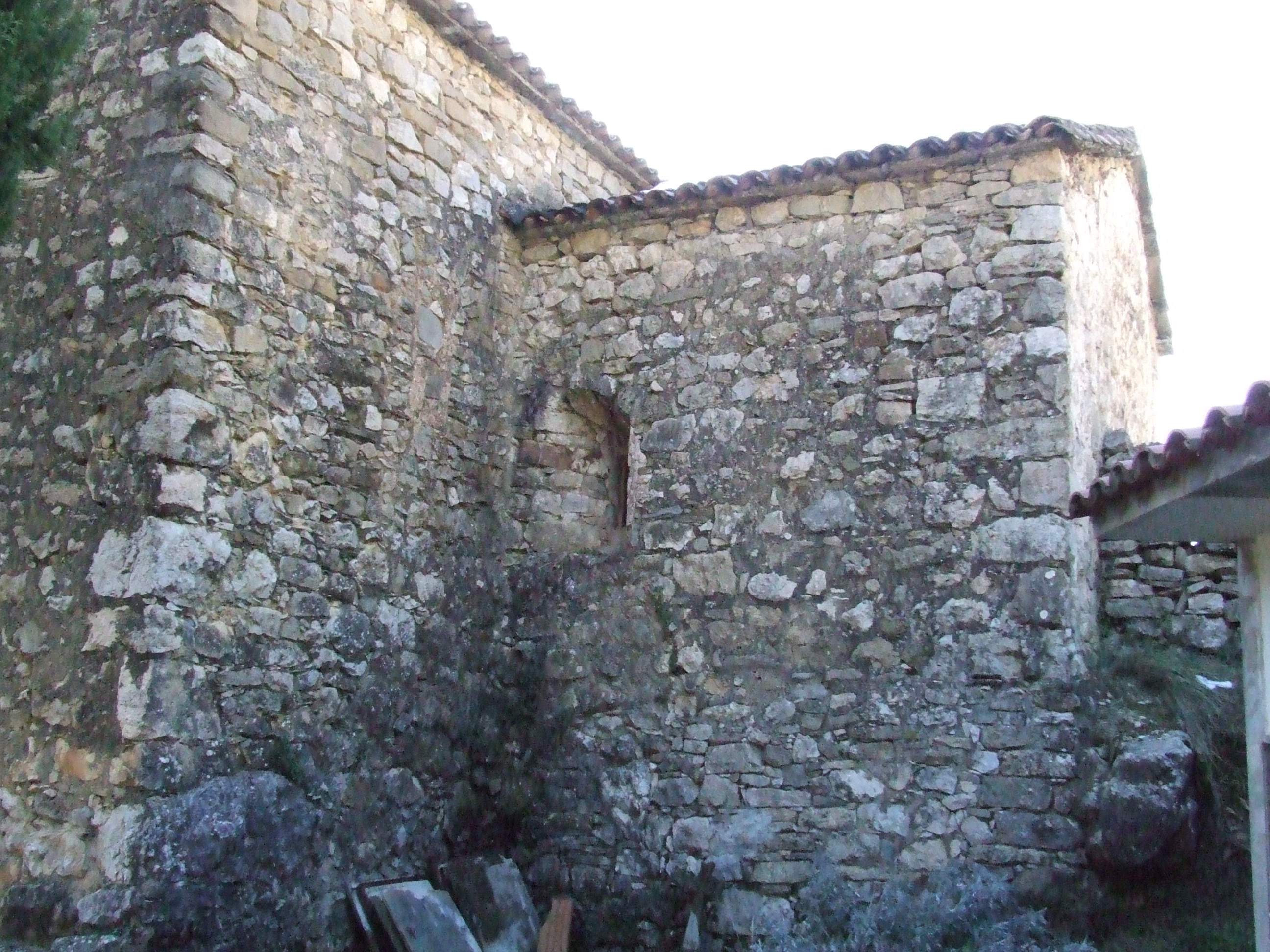 Detalls de romànic a Sant Miquel de la Vall (Aransís, Gavet de la Conca, Pallars Jussà)